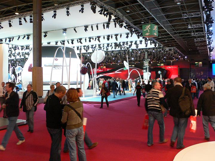 Mondial de l'auto de paris 2008